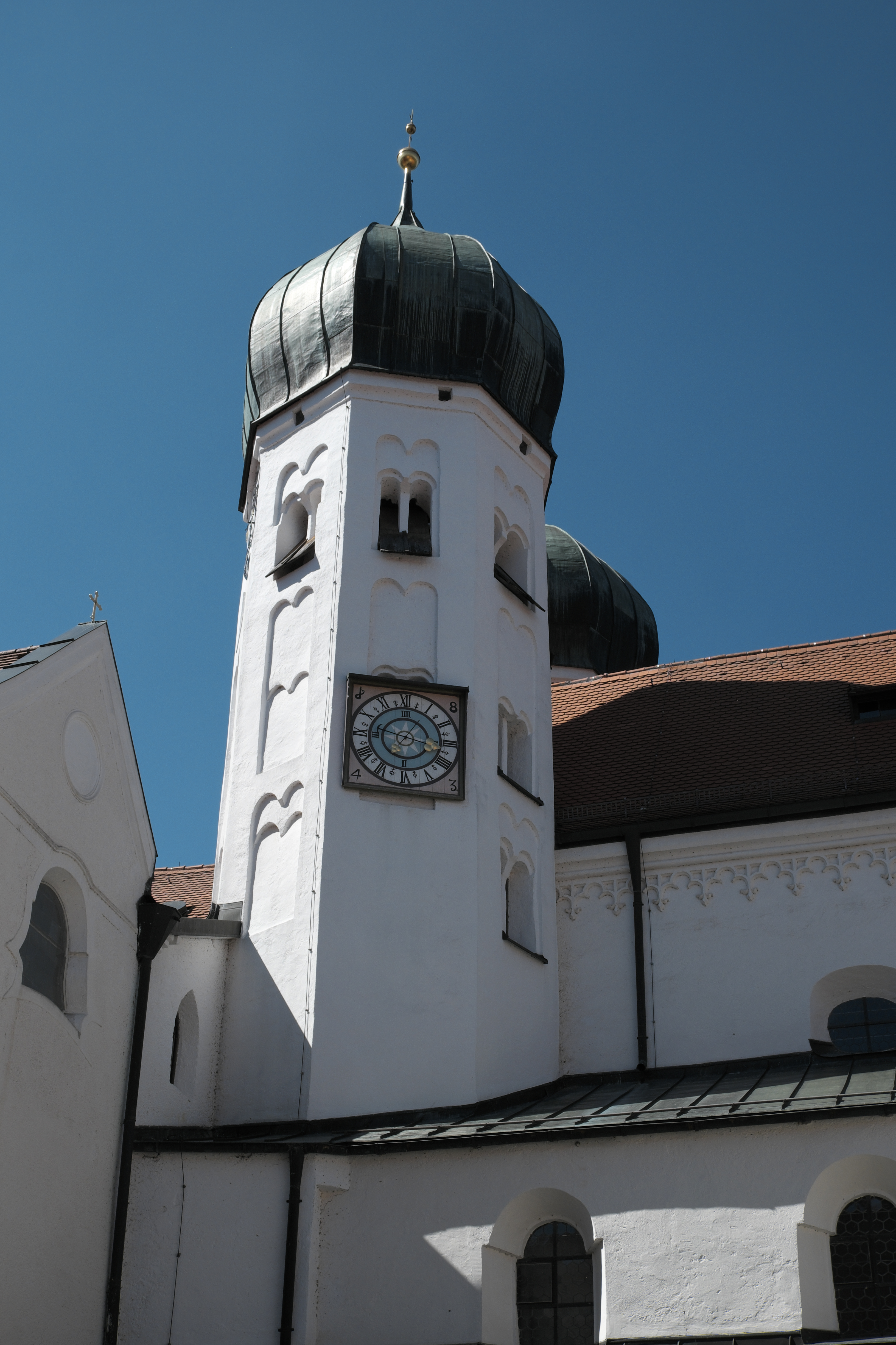 Katholische Pfarrkirche, ehemalige Benediktinerklosterkirche St. Lambert in Klosterseeon, einem Ortsteil von Seeon-Seebruck im Landkreis Traunstein (Bayern/Deutschland), Türme